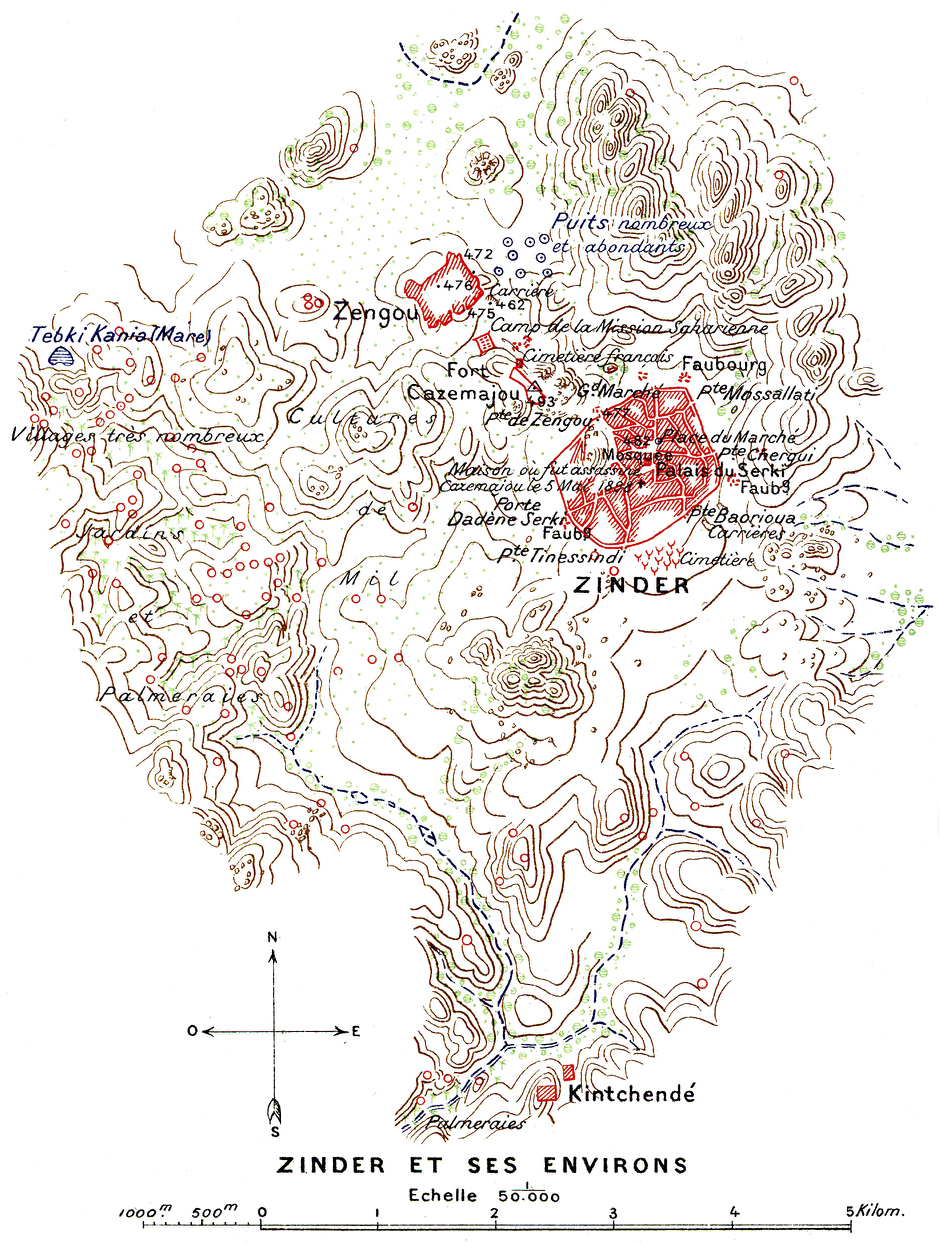 Mission Foureau-Lamy : Zinder et ses environs.